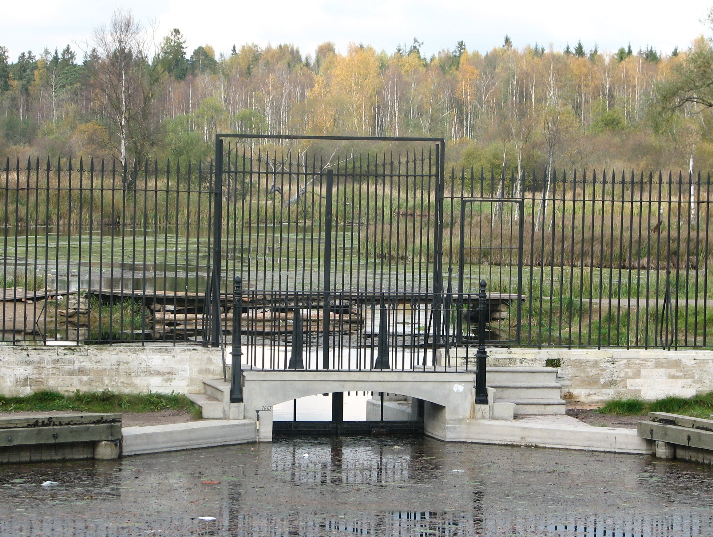 Шлюз в Дворцовом парке Гатчины